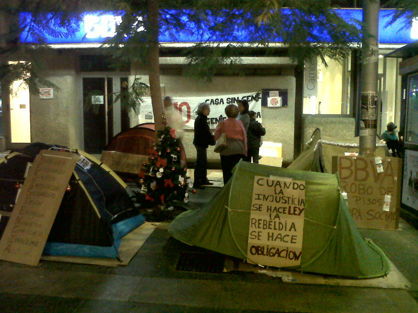 Plataforma frente al BBVA en Santa Cruz de Tenerife, en la Calle Castillo, para paralizar los desahucios.